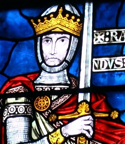 Raimund IV. z Toulouse